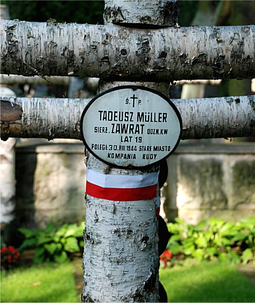 Tadeusz Müller - nad mogiłą na Powązkach wojskowych w Warszawie